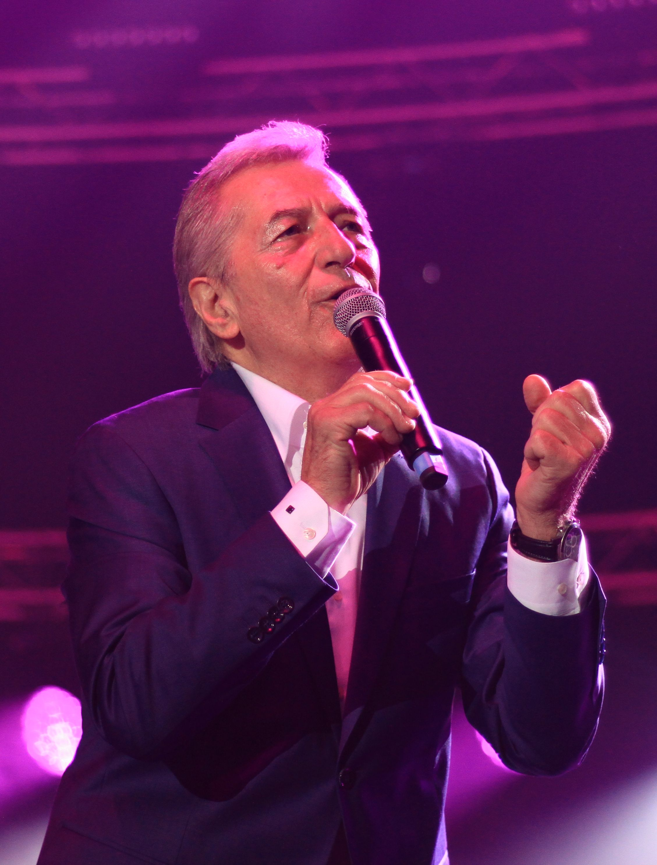 Мирослав Илич - сръбски фолки и поп певец